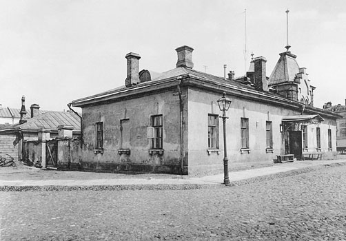 Watchdog house at Babegorodskoy dam in Moscow Сторожевой дом при Бабьегородской плотине в Москве